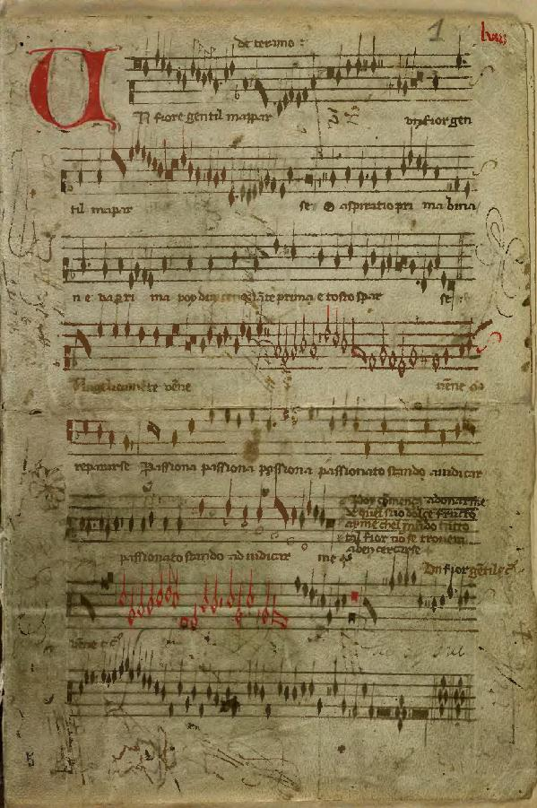 Codex Mancini